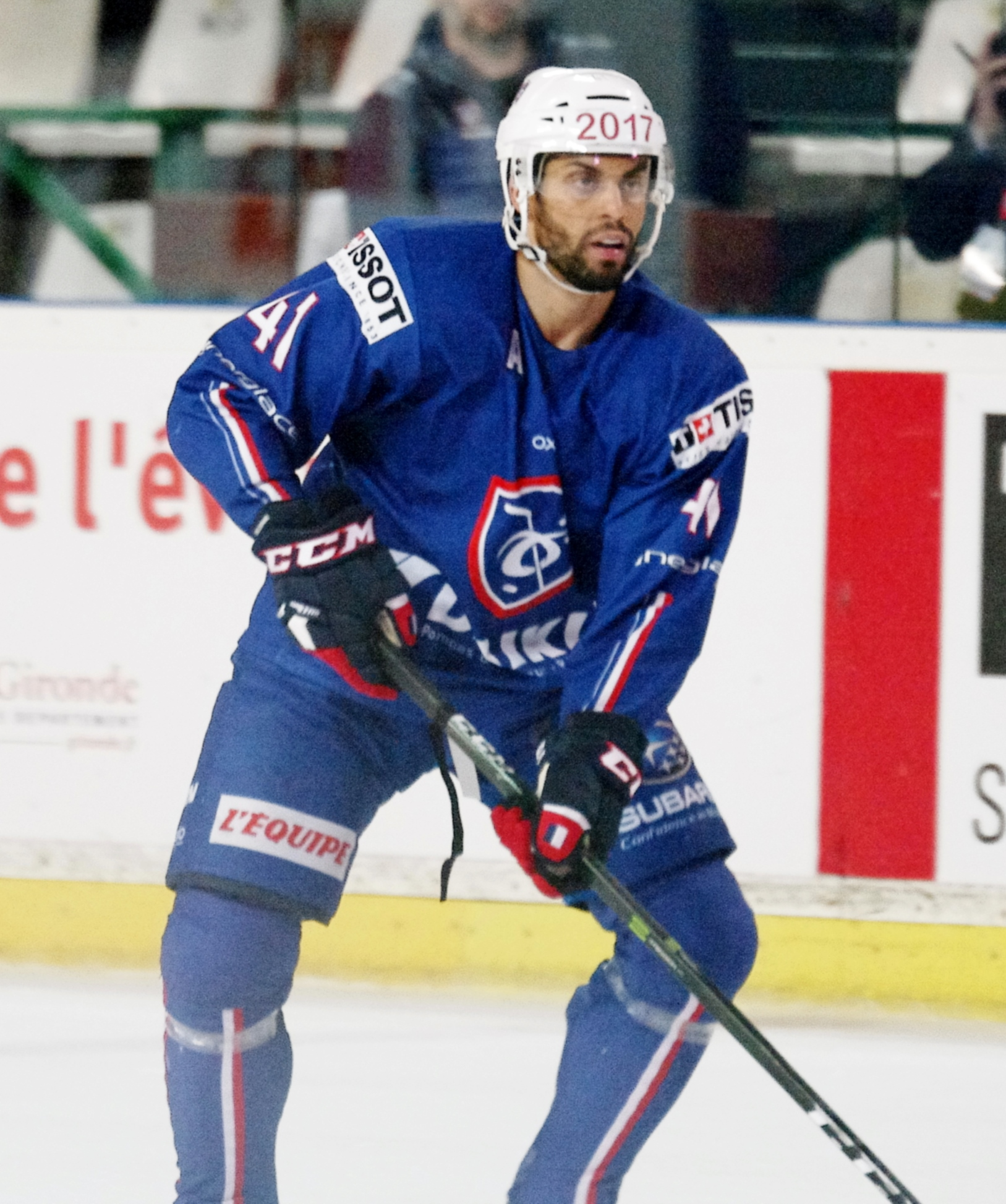 France vs. Biélorussie, 1er mai 2017